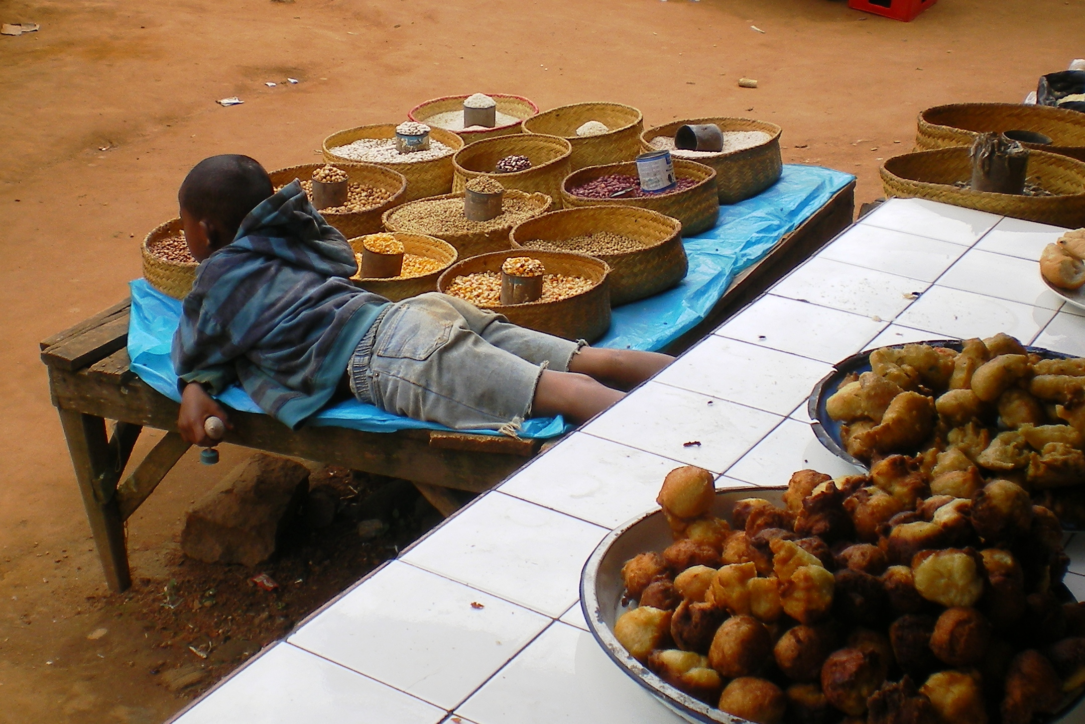 Un gamin au marche de Miarinavaratra attend les chalands